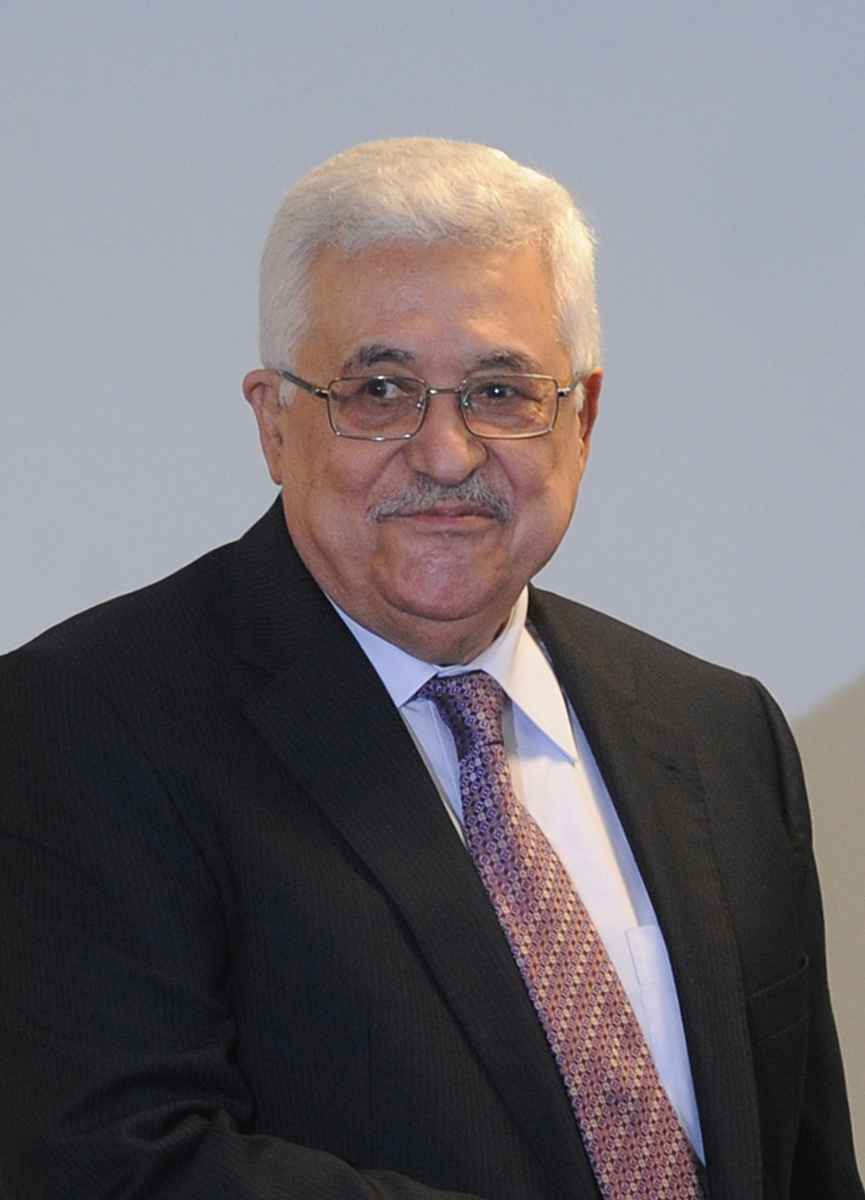 Presidente da Autoridade Nacional Palestina, Mahmoud Abbass, no Palácio do Planalto. Brasília, 2 de janeiro de 2011.